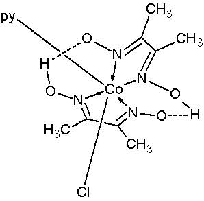 Estructura de una cobaloxima simple